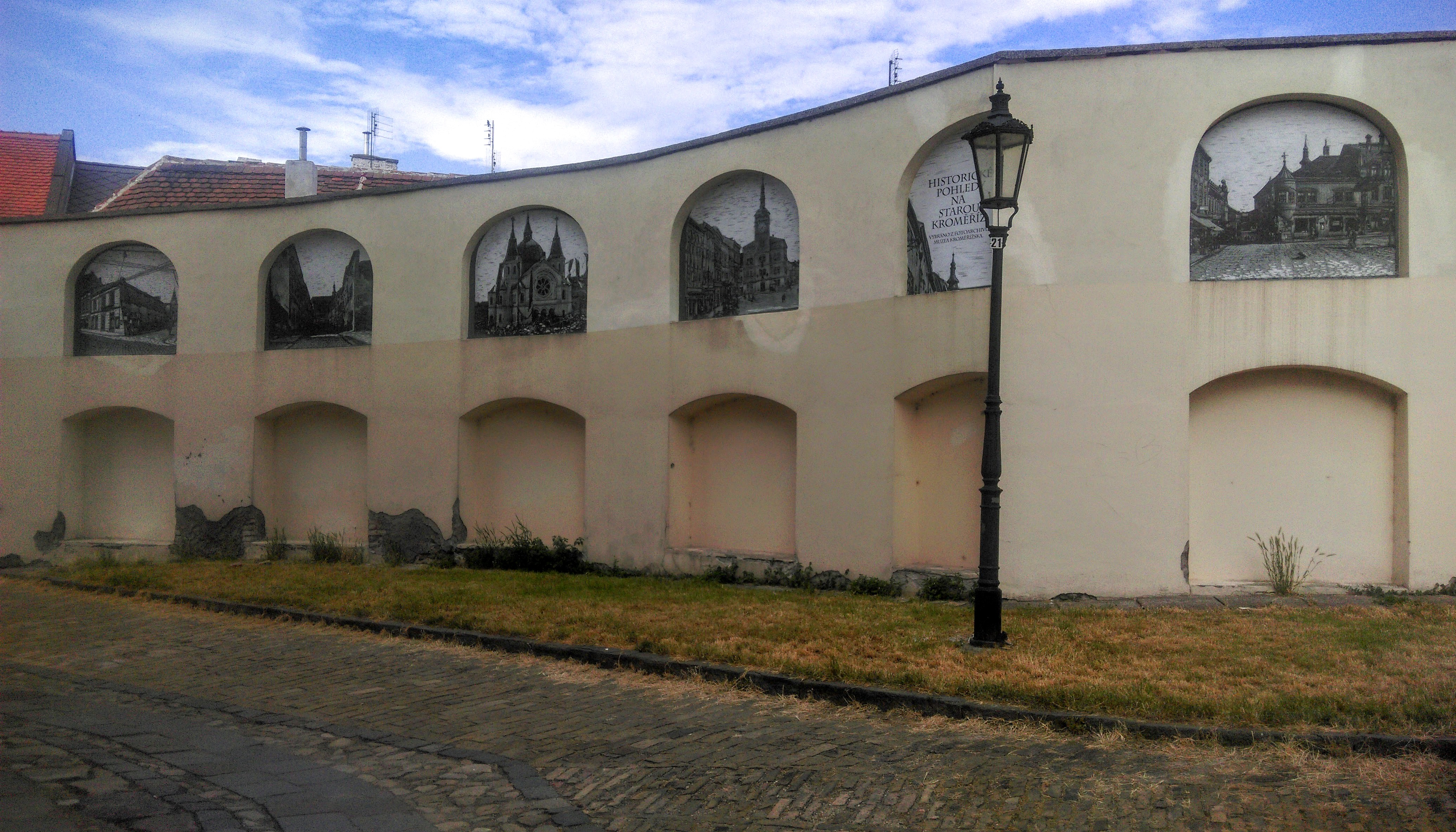 Separační zeď Kroměříž, veduty